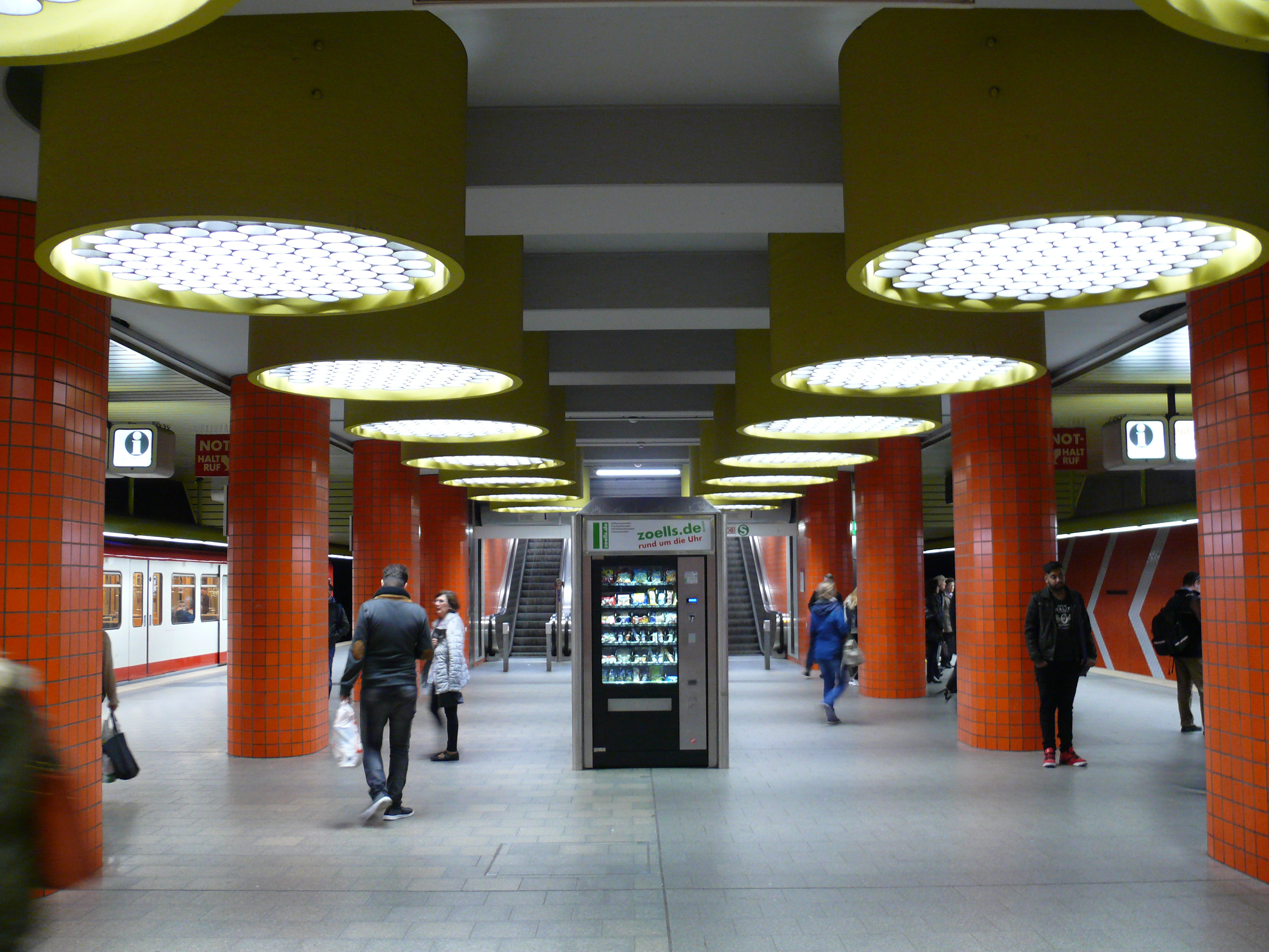 Deckenleuchten in der Bahnsteigebene -3 am U-Bahnhof Hauptbahnhof in Nürnberg.